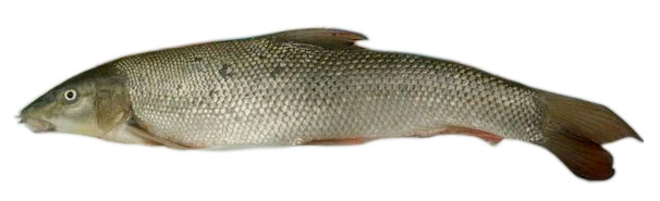 Flussbarbe (Barbus barbus)